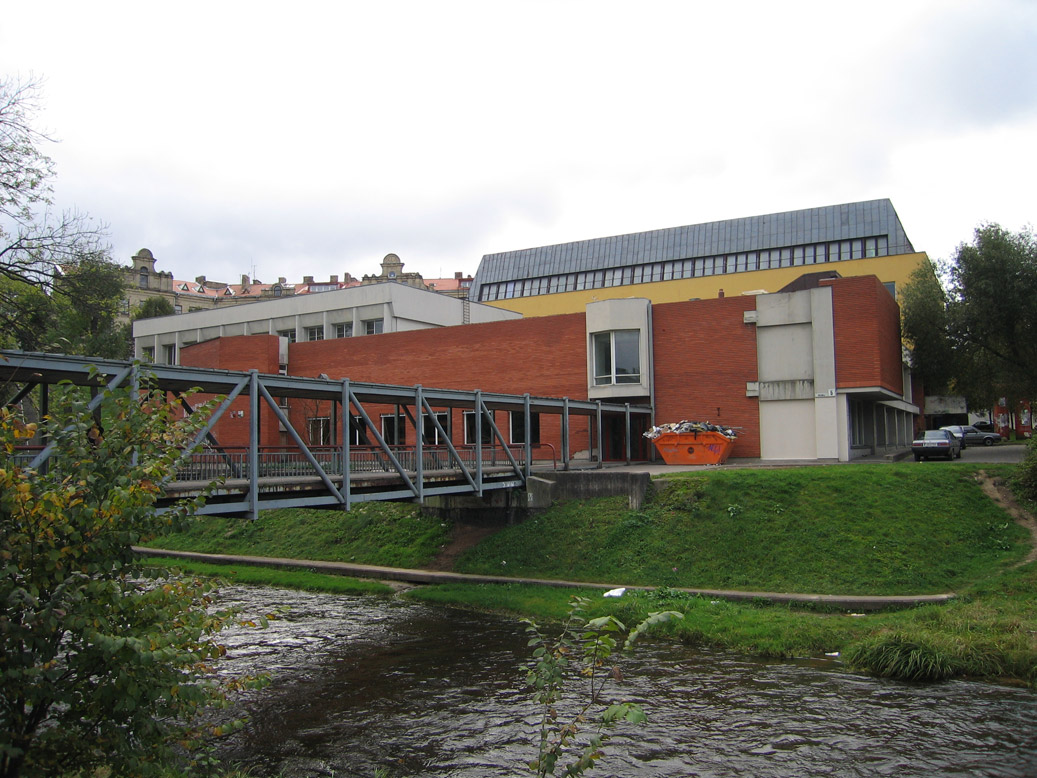 Vilnius Art Academy